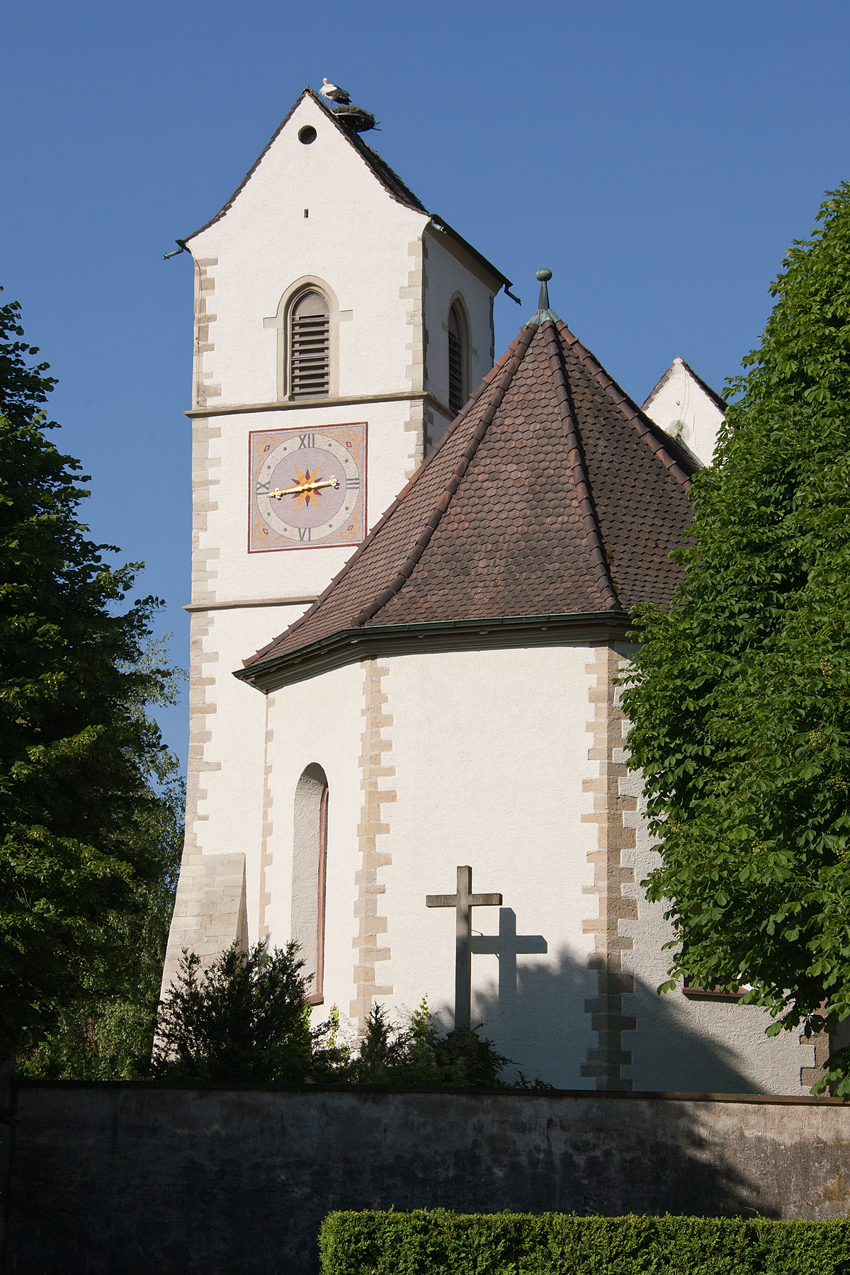 Christkatholische Pfarrkirche St. Peter und Paul in Allschwil (BL)